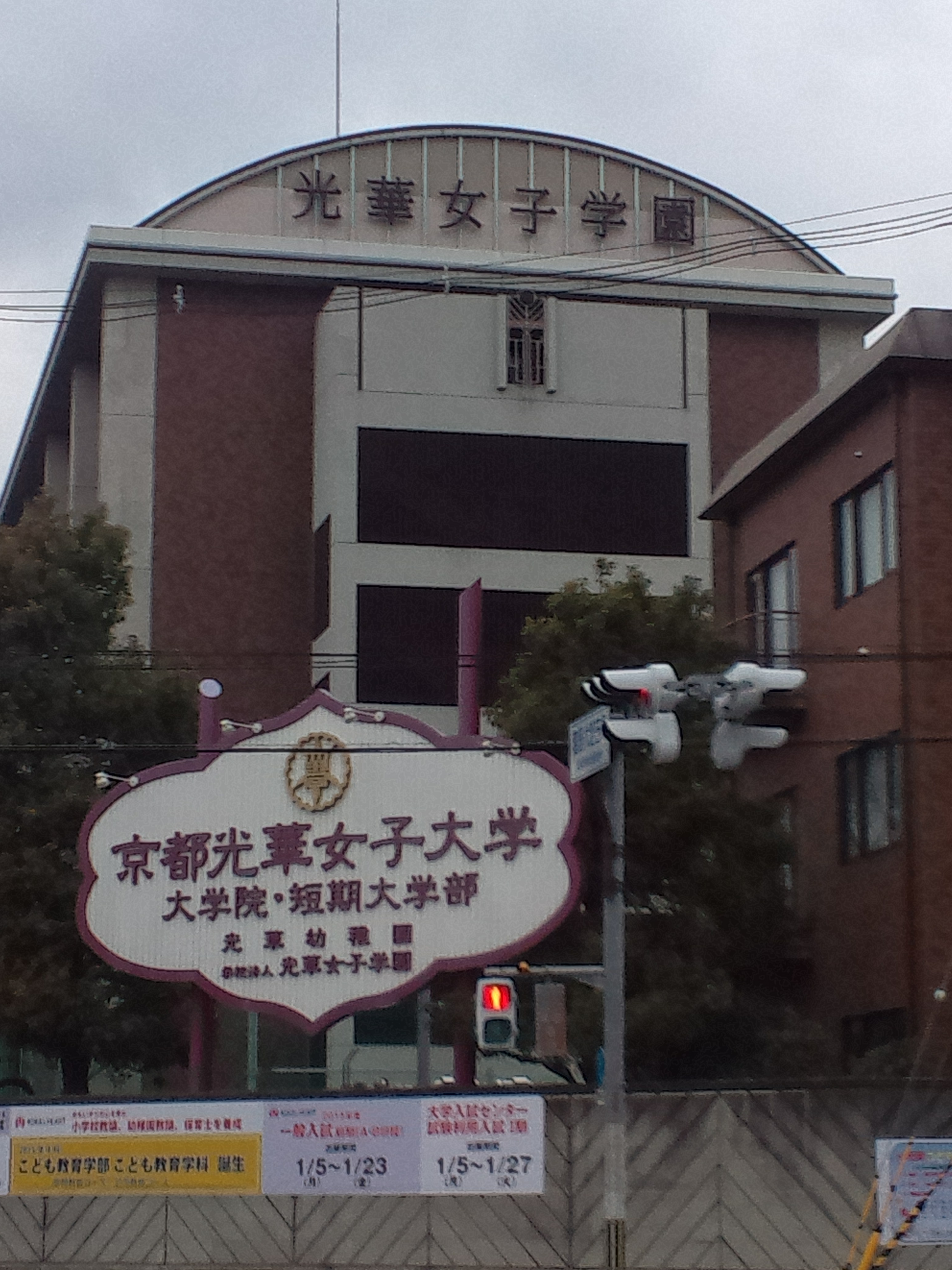 京都光華女子大学 慈光館